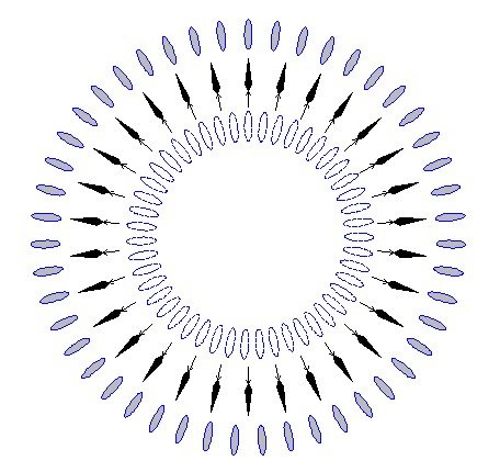 תמרון הקיקלוסיס של האתונאים בקרב ארטמיסיון, 480 לפנה"ס